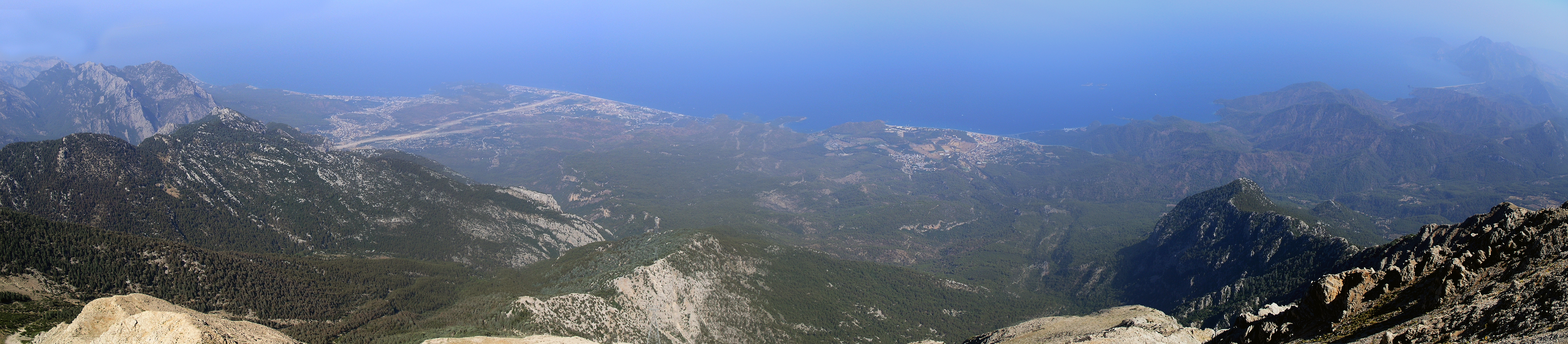 Панорама побережья с вершины горы Тахталы